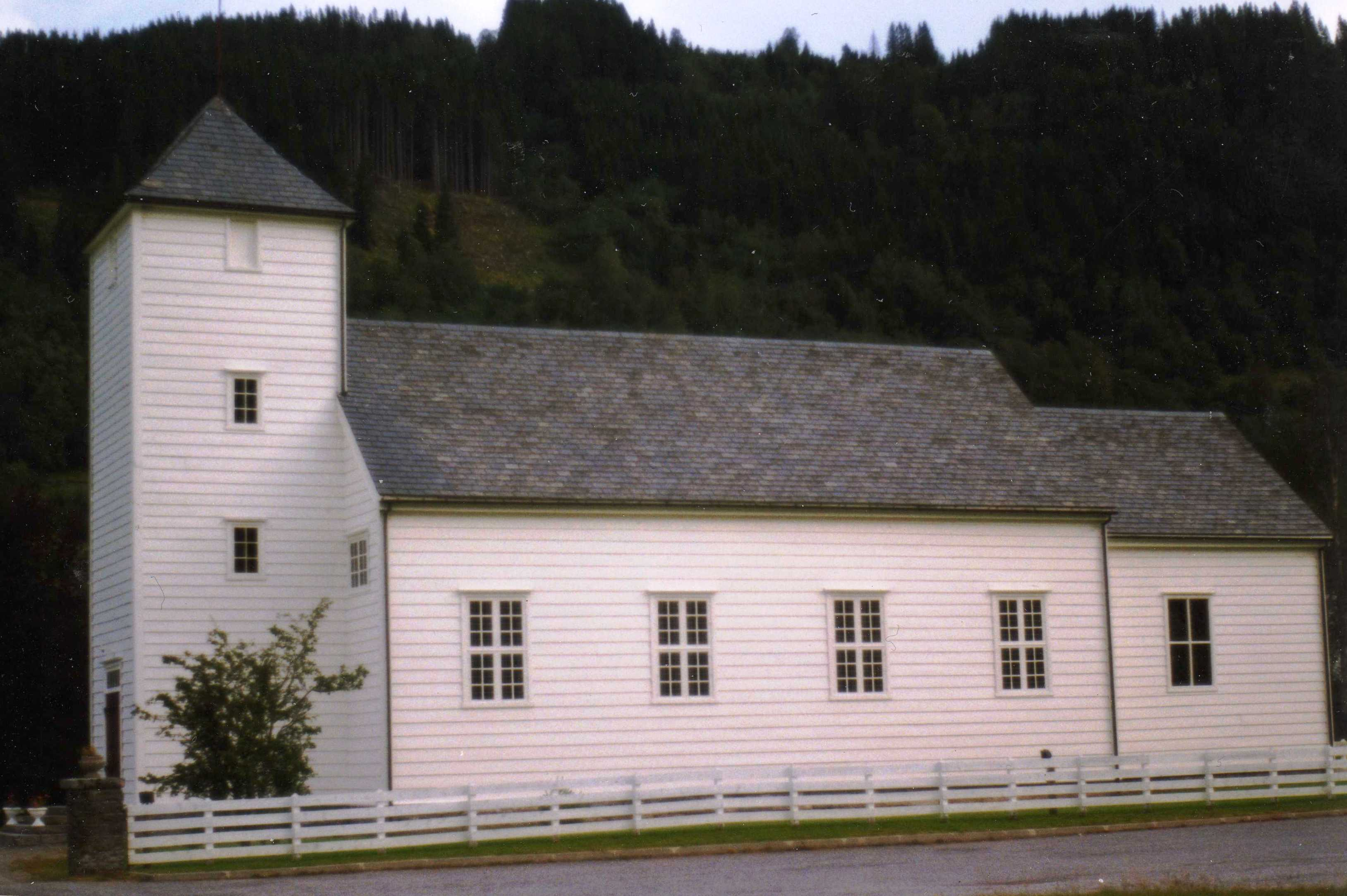 Bygstad kirke, Bygstad Church